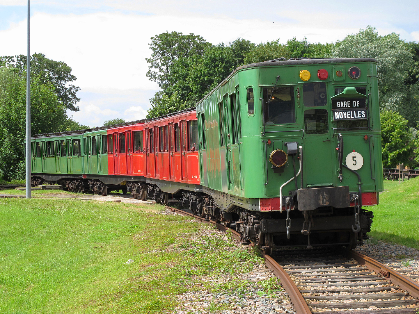 Une rame Sprague-Thomson du métro parisien et préservée par l'ADEMAS, sur le site de Versailles le 23 juin 2013.